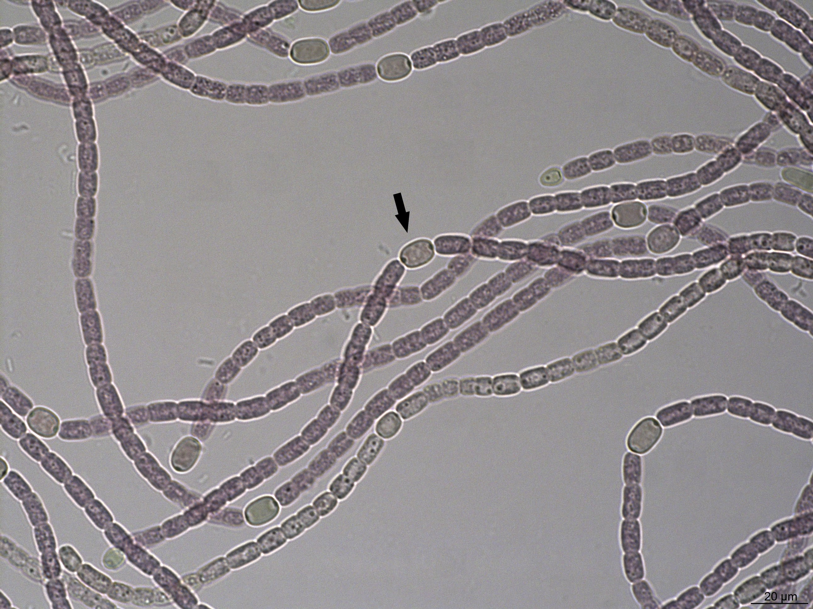 Εικόνα 1: Μικροφωτογραφία του στελέχους Anabaena sp.TAU-MAC 0299. Το βέλος δείχνει ένα ετεροκύτιο. Πηγή: Gkelis & Panou (2016) [4].